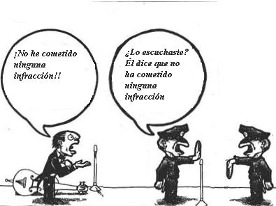 Diálogo